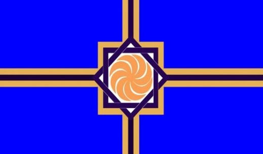 предполагаемый флаг Республики Западной Армении